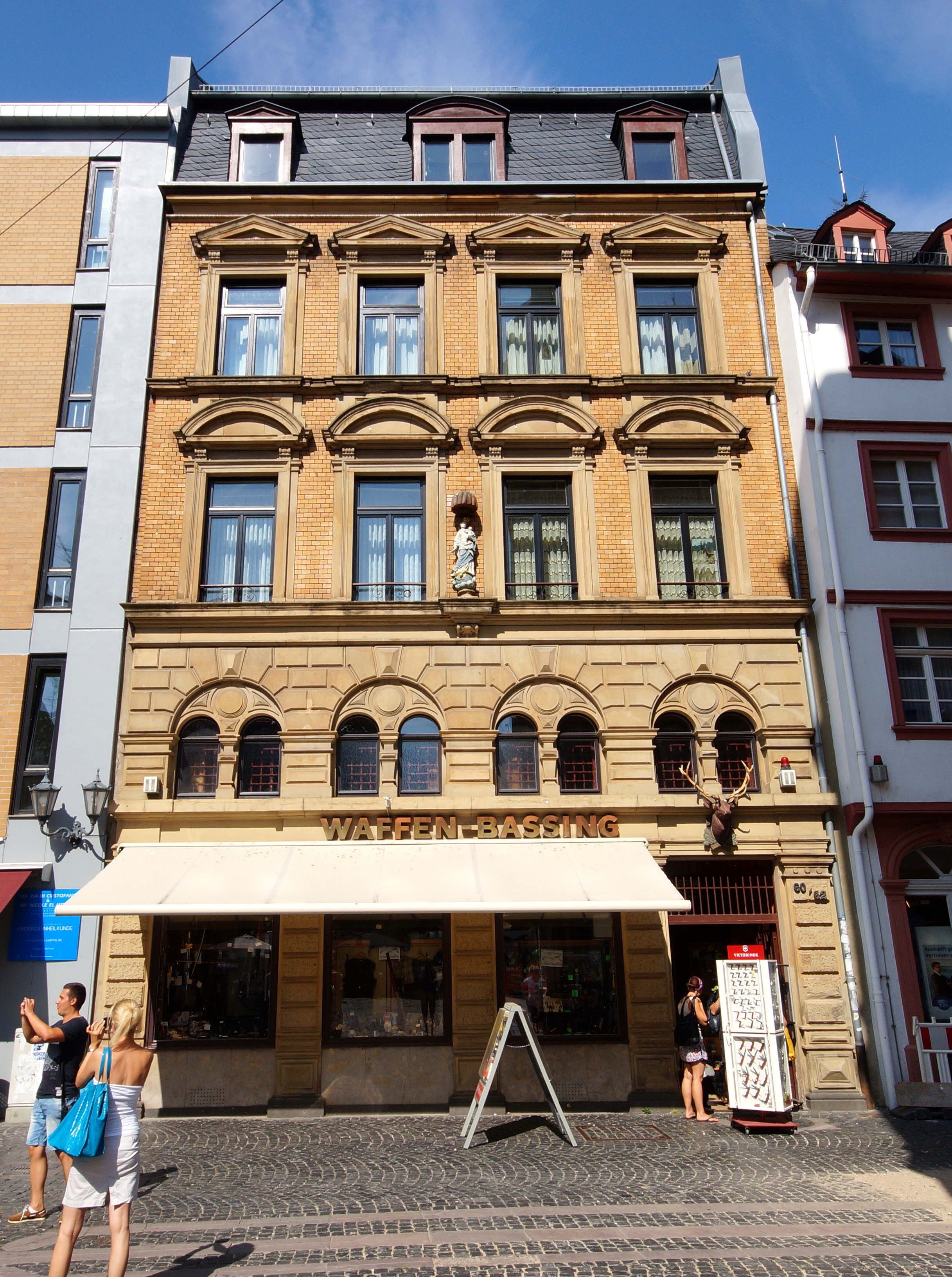 Die Fassade des Doppelhauses mit den Hausnummern 60 und 62 in der Augustinerstraße in Mainz-Altstadt